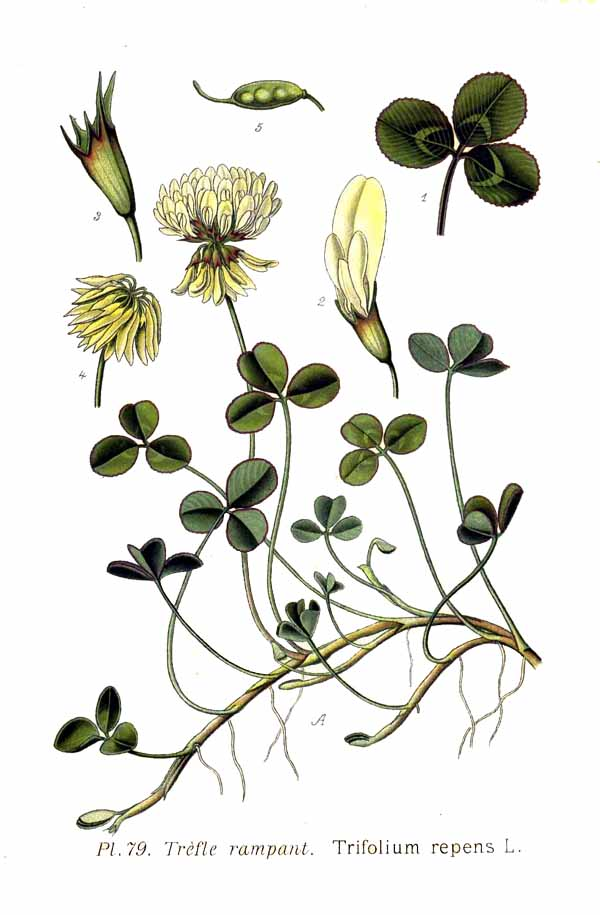 Trifolium repens L.